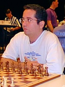 Walter Arencibia, Recklinghäuser Schachtage 1998.